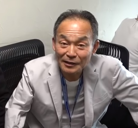 高木豊のYouTube動画に出演する木田勇